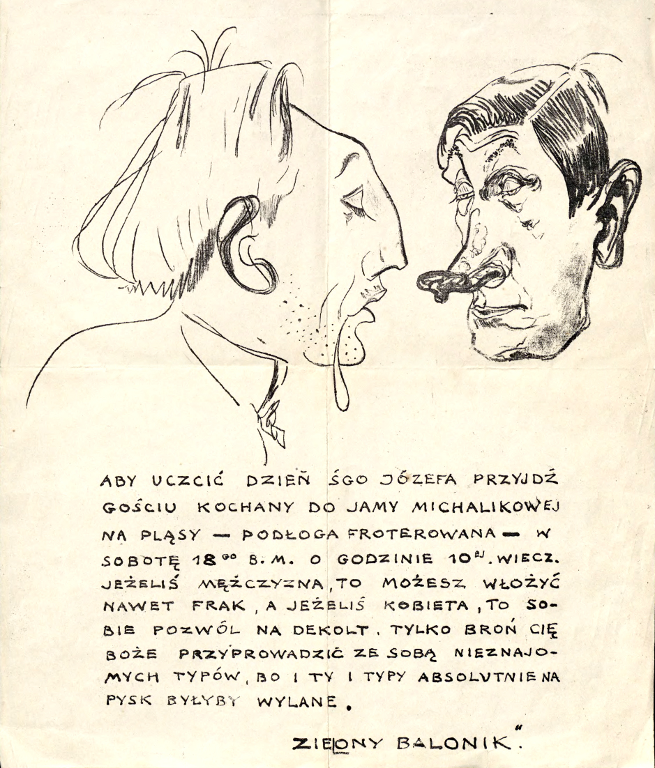 Zaproszenie do „Zielonego Balonika” : Aby uczcić dzień śgo Józefa przyjdź gościu kochany do Jamy Michalikowej na pląsy […]